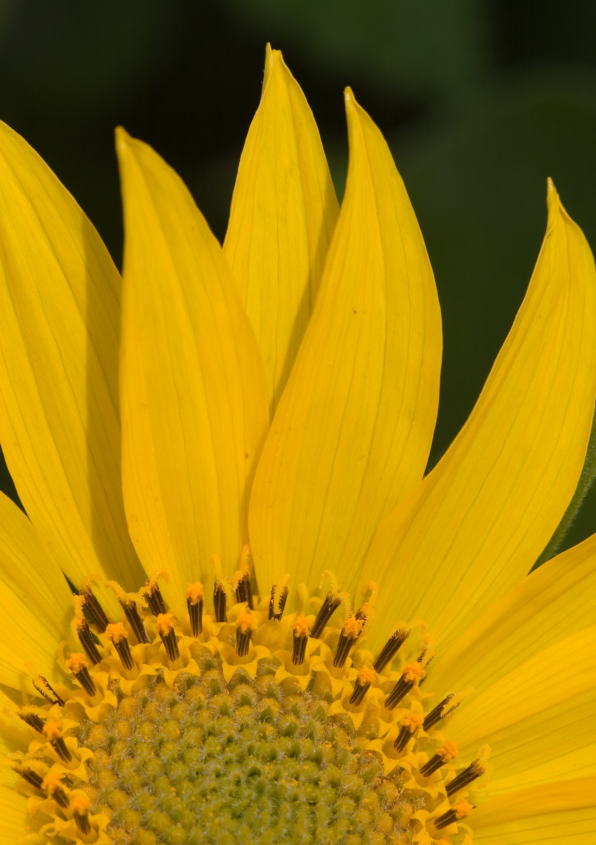 Balsamorhiza deltoidea. Common names: Balsamroot, Northwest Balsamroot, Deltoid Balsamroot.